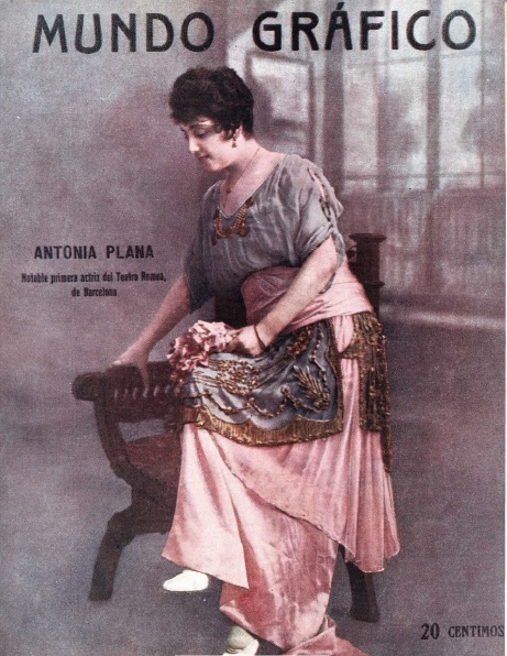 Fotografía de la actriz española Antonia Plana publicada en 1915 en la portada de Mundo Gráfico